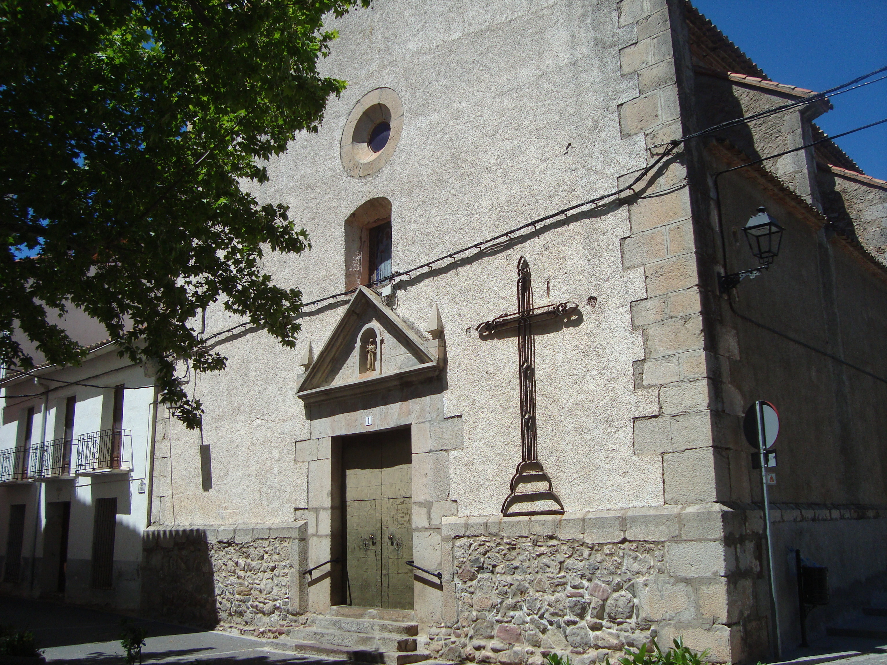 Església parroquial de Sant Bernadí (Cirat) 08.046-006.